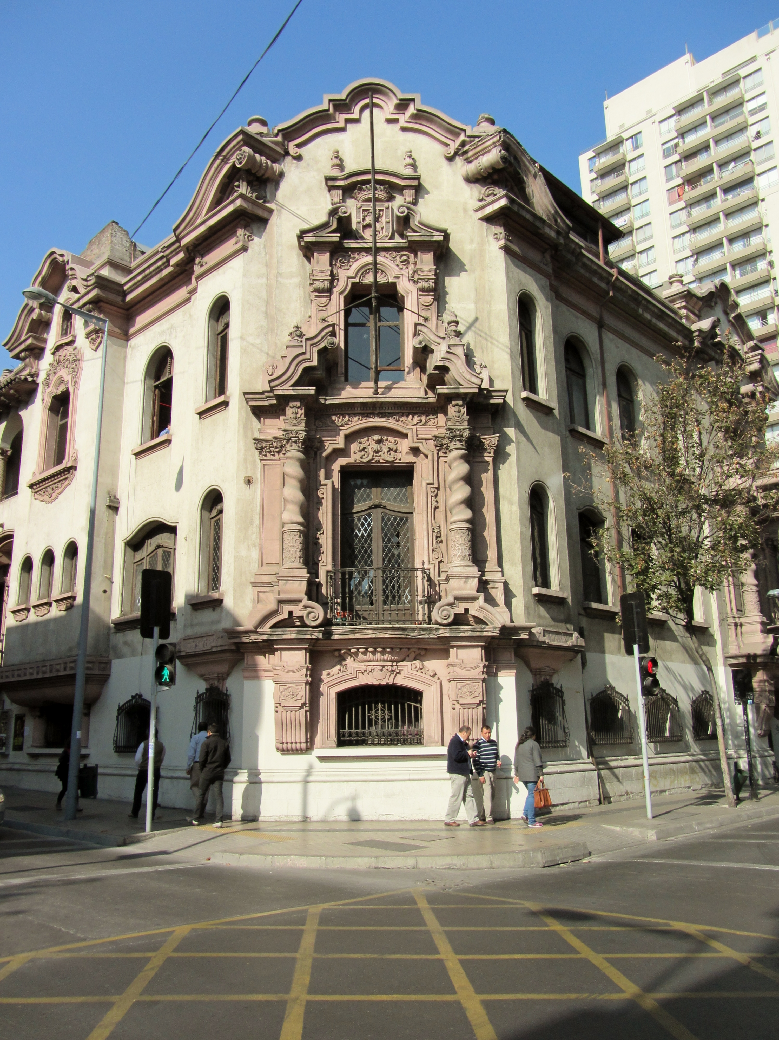 La casa Ariztia, construida para Luisa Ariztia en 1925 por los arquitectos Ismael Edwards Matte y Federico Biéreguel, en la calle Monjitas, Santiago de Chile. Fue sede del Partido Radical; después, en época de la dictadura, pasó a manos de la DINA, luego fue utilizada por el Instituto Chileno-Británico y más tarde fue entregada al Partido Radical Socialdemócrata.